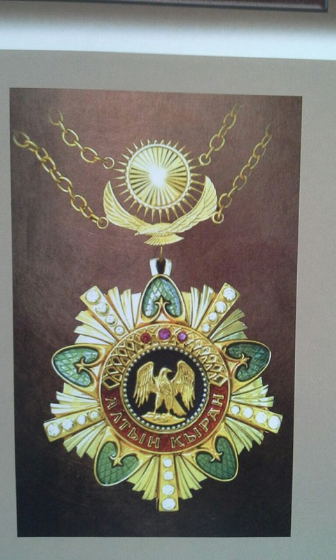 Қазақша (кирил): "Алтын Қыран" ордені